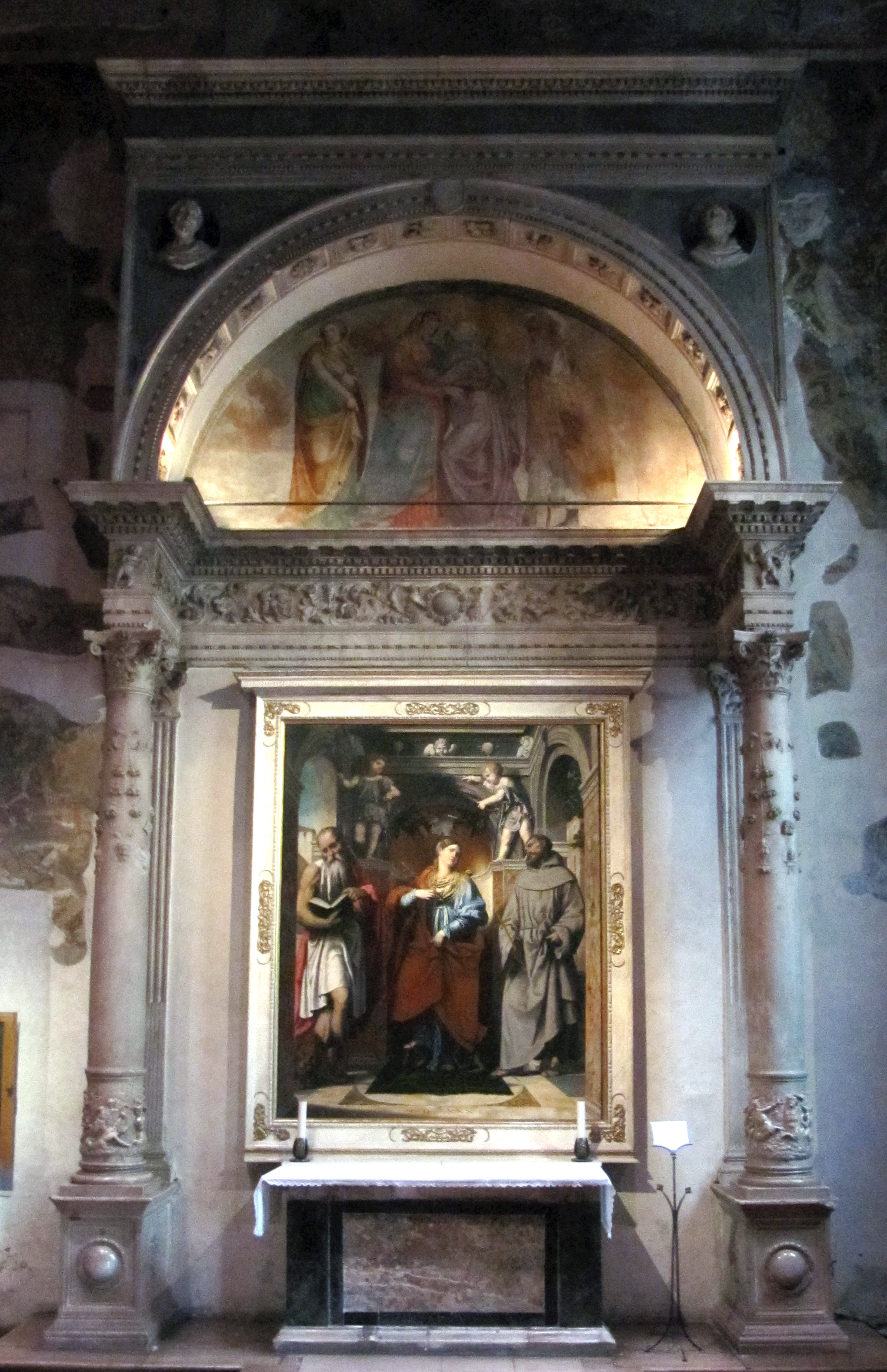 altare di san girolamo (san francesco brescia, gasparo cairano, antonio medaglia)